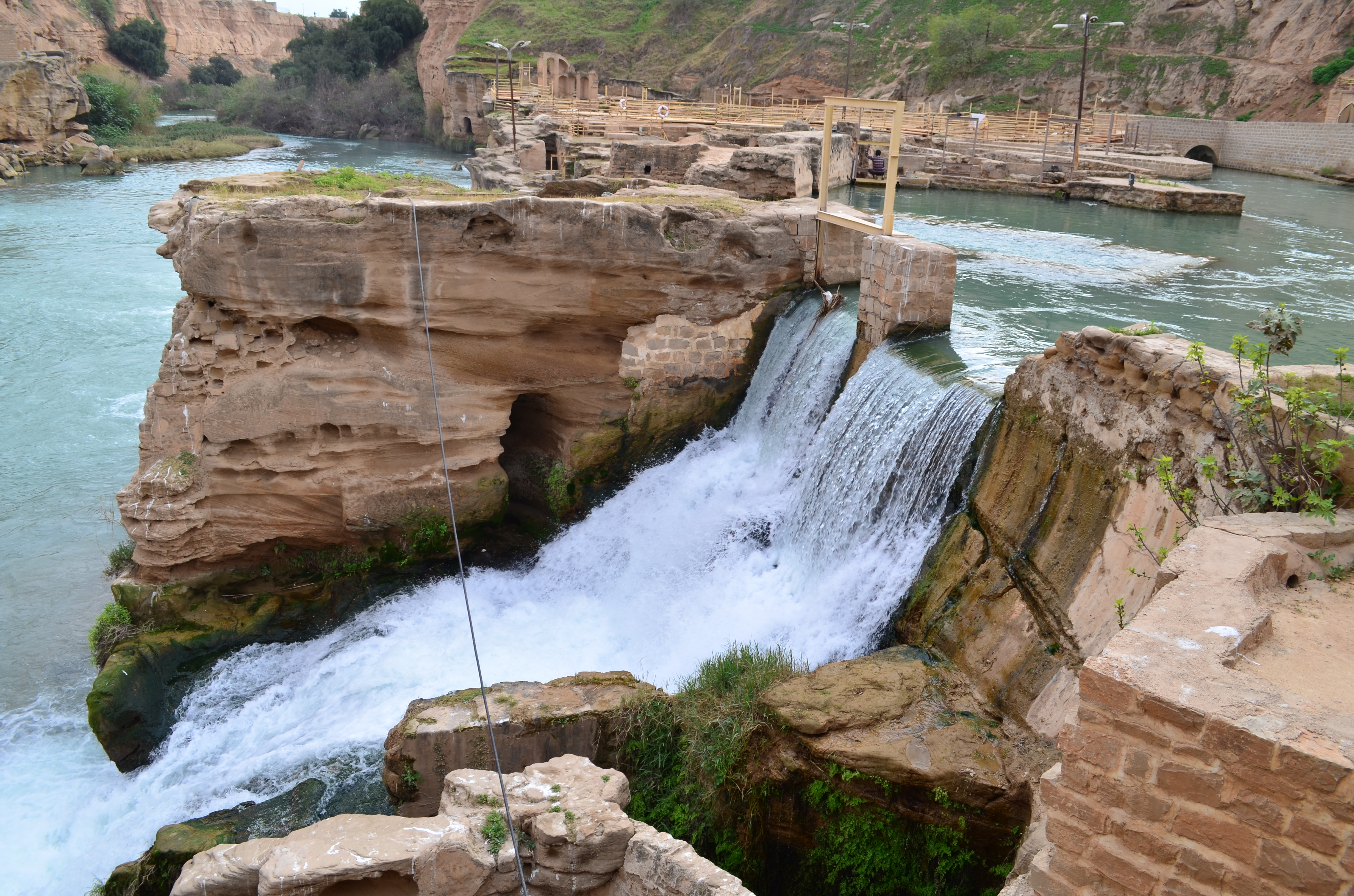 مجموعه آبشارها و آسیاب‌های آبی شوشتر در سازه‌های آبی شوشتر